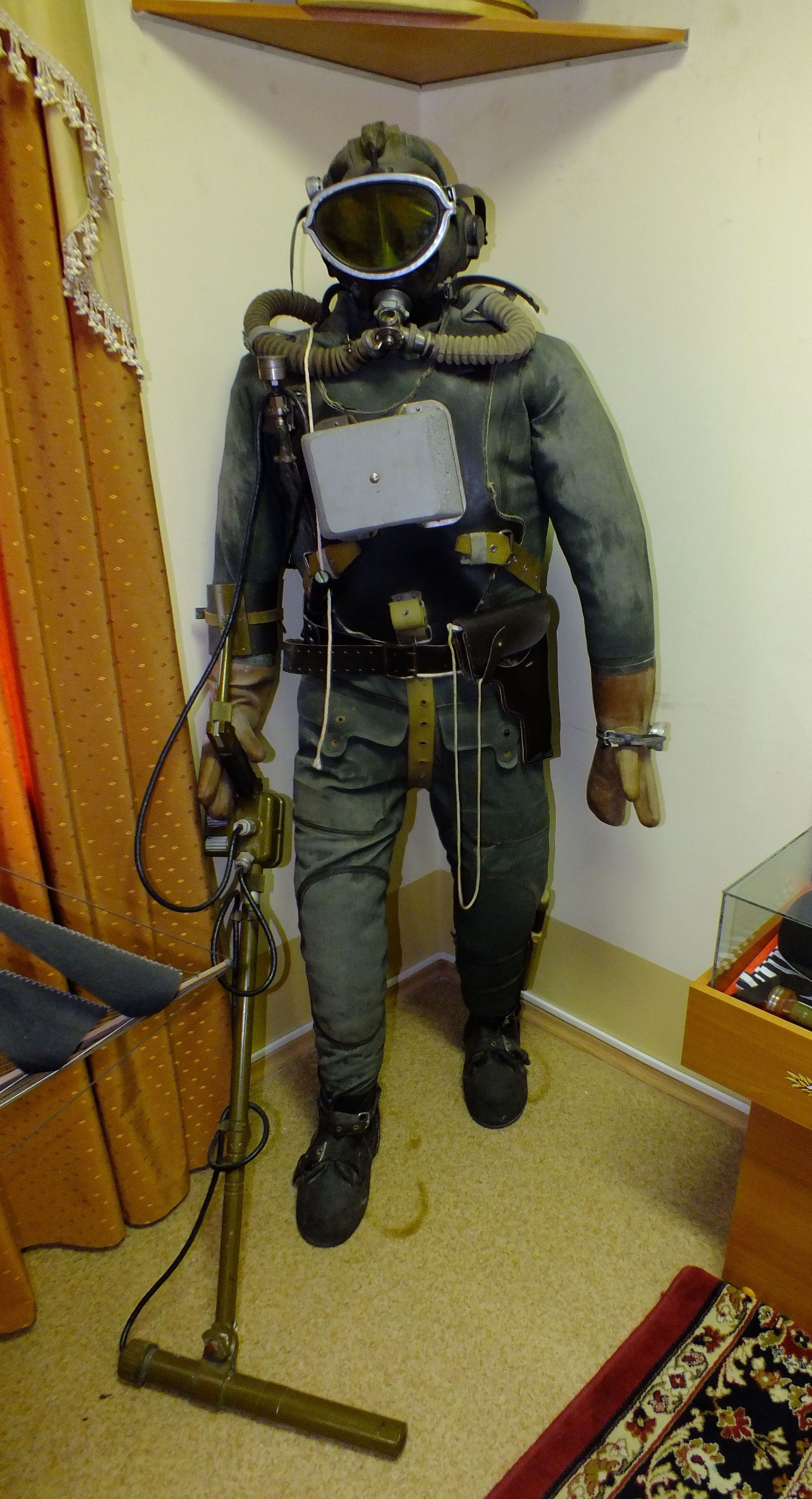 В музее Внутренних войск МВД РФ Хабаровск